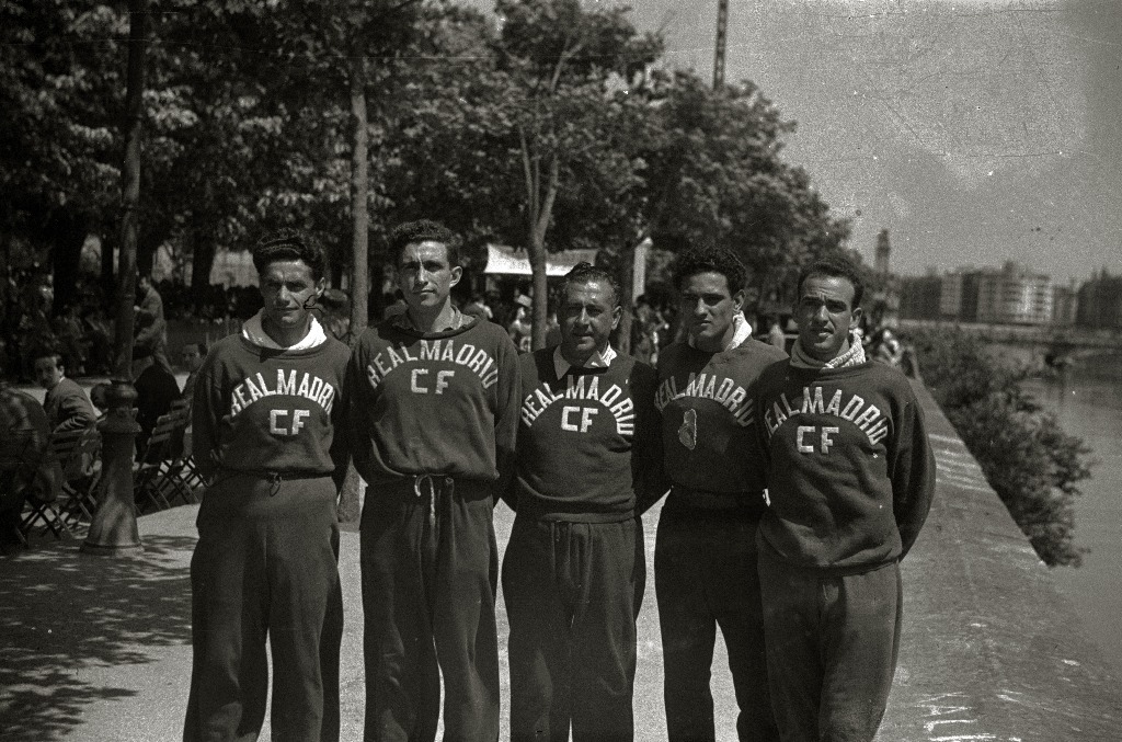 Título original: Participantes del circuito de los puentes en el Paseo del Árbol de Gernika. El secretario general del gobernador civil Alejandro Cabezas participaba en la entrega de trofeos Localización: San Sebastián (Guipúzcoa)